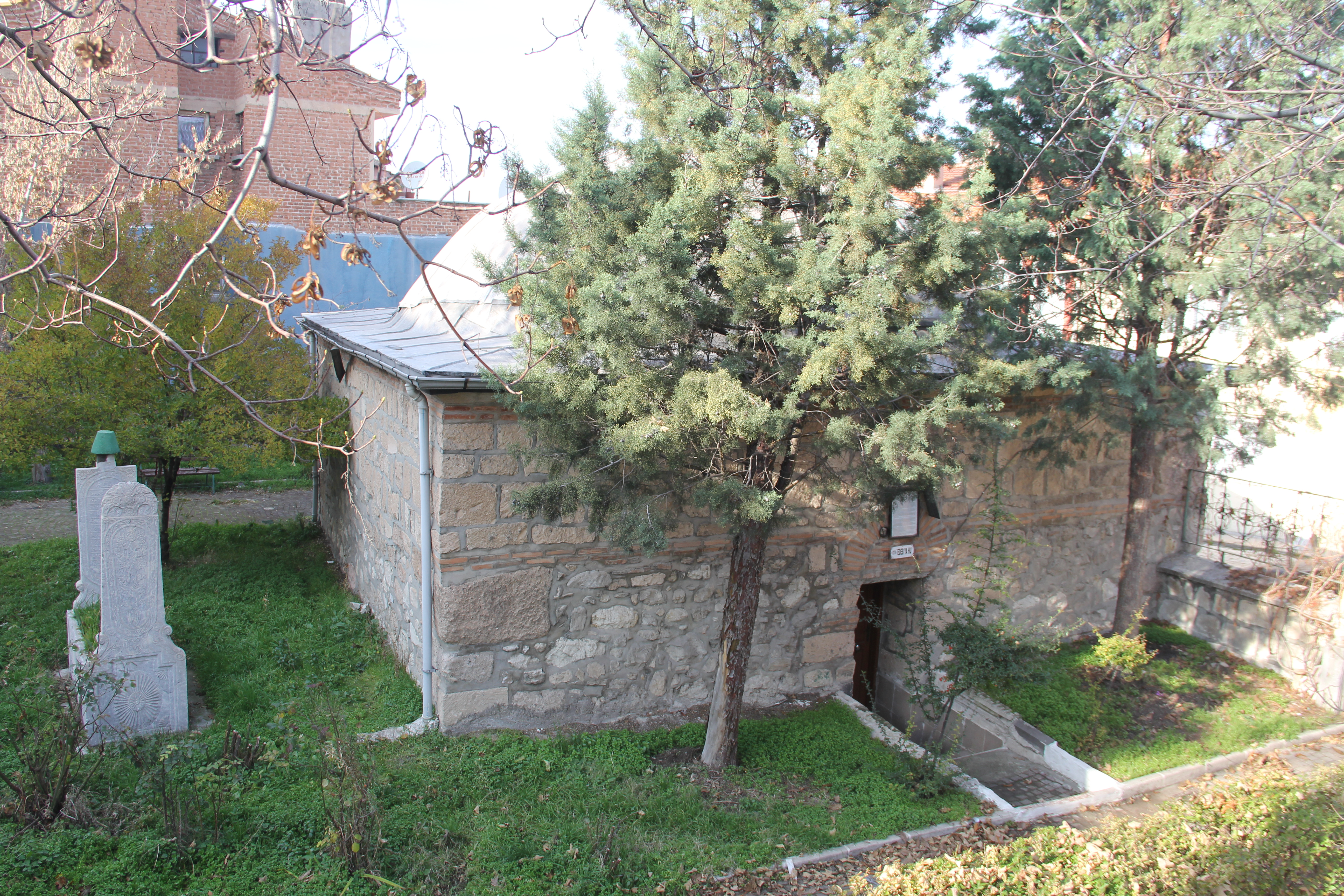 Gümüş Eşik Tekkesi ve Gazi Hüseyin Paşa Kabri